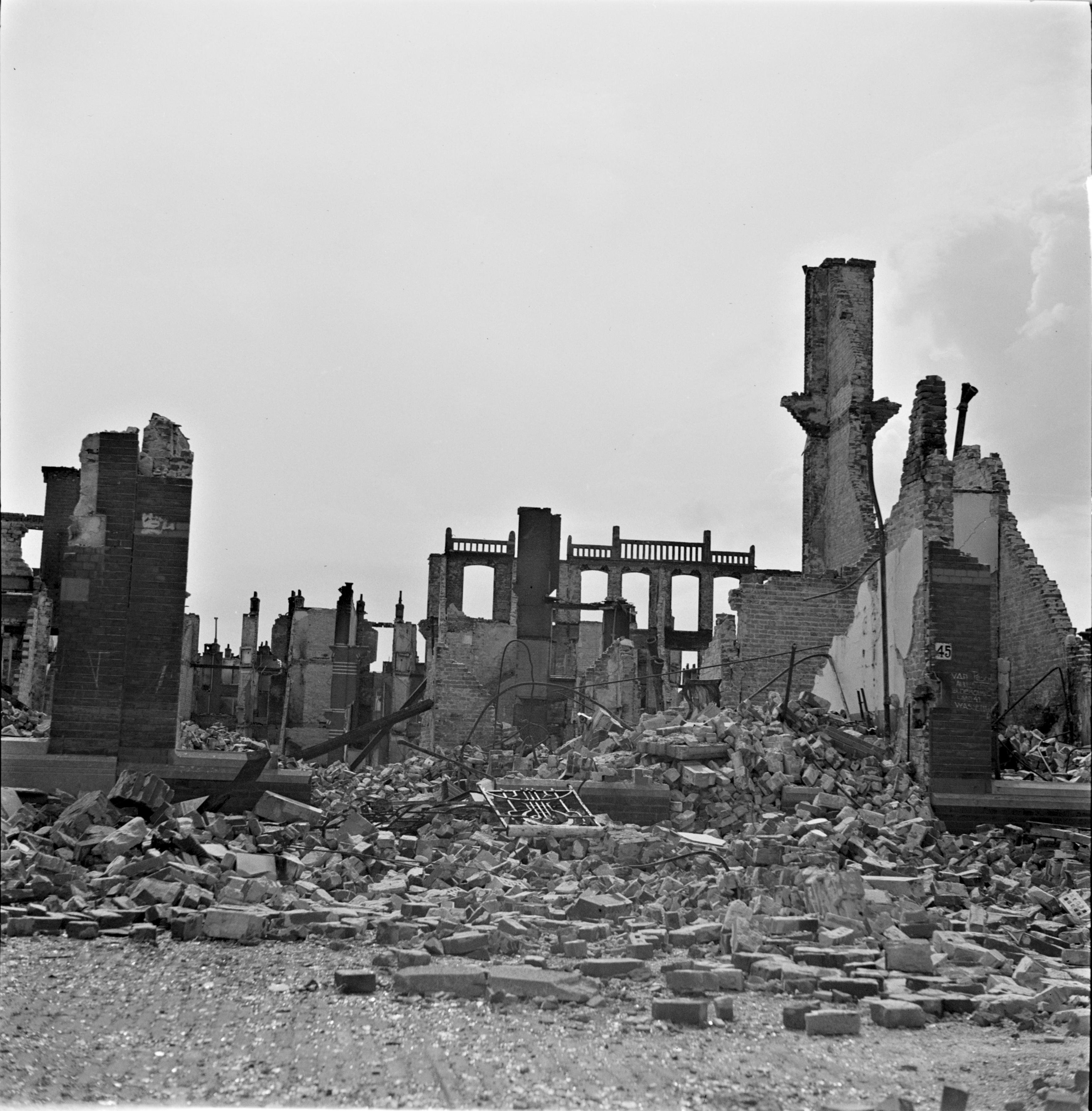 Oorlogsschade in Den Haag: gevolgen van het bombardement op het Bezuidenhout